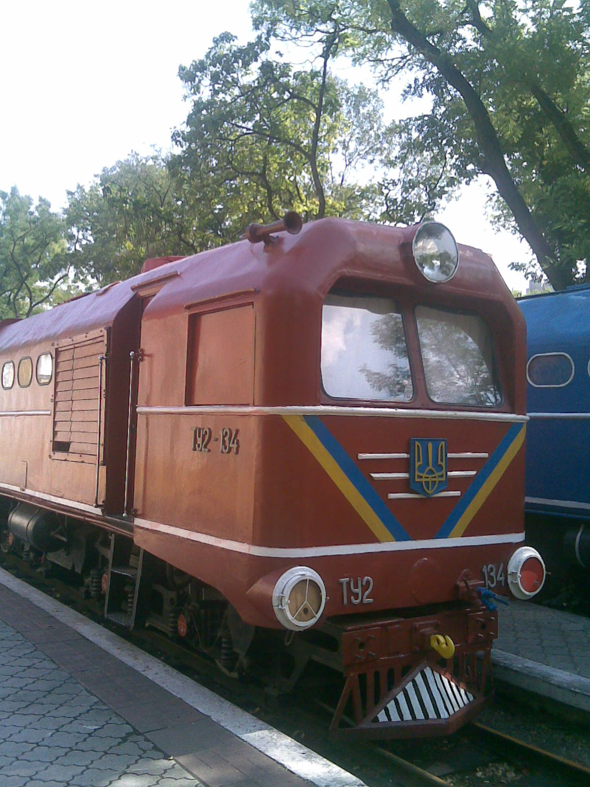 Тепловоз ТУ2-134, Днепропетровская ДЖД